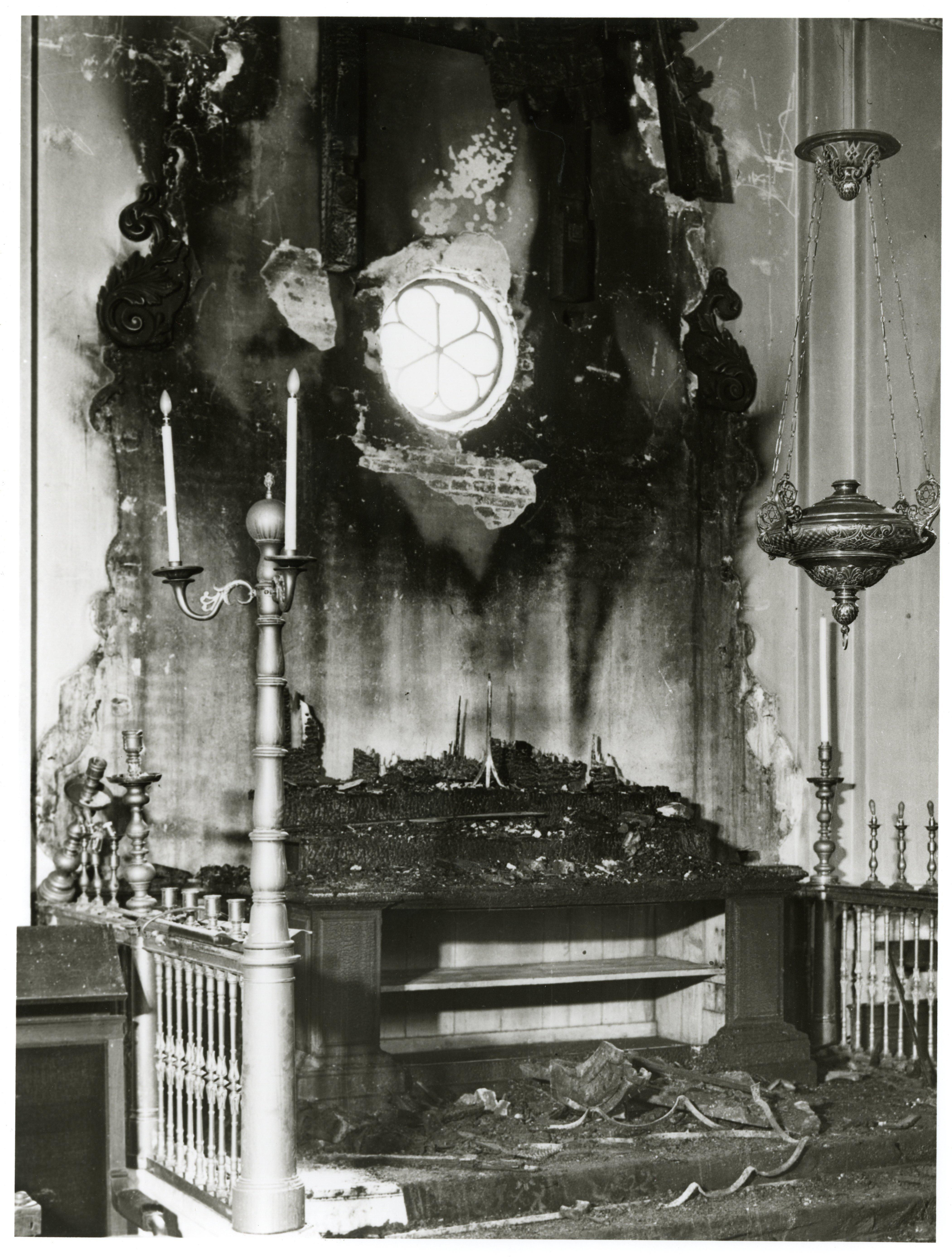 Verwoeste Heilige Ark in de synagoge in de Wagenstraat na brandstichting t.g.v. de verjaardag van Hitler